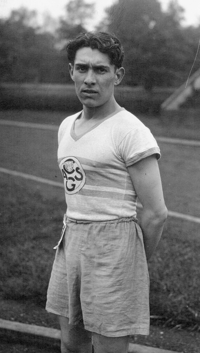 Stade Persching : challenge du Mille : Ladoumègue : [photographie de presse] / Agence Meurisse